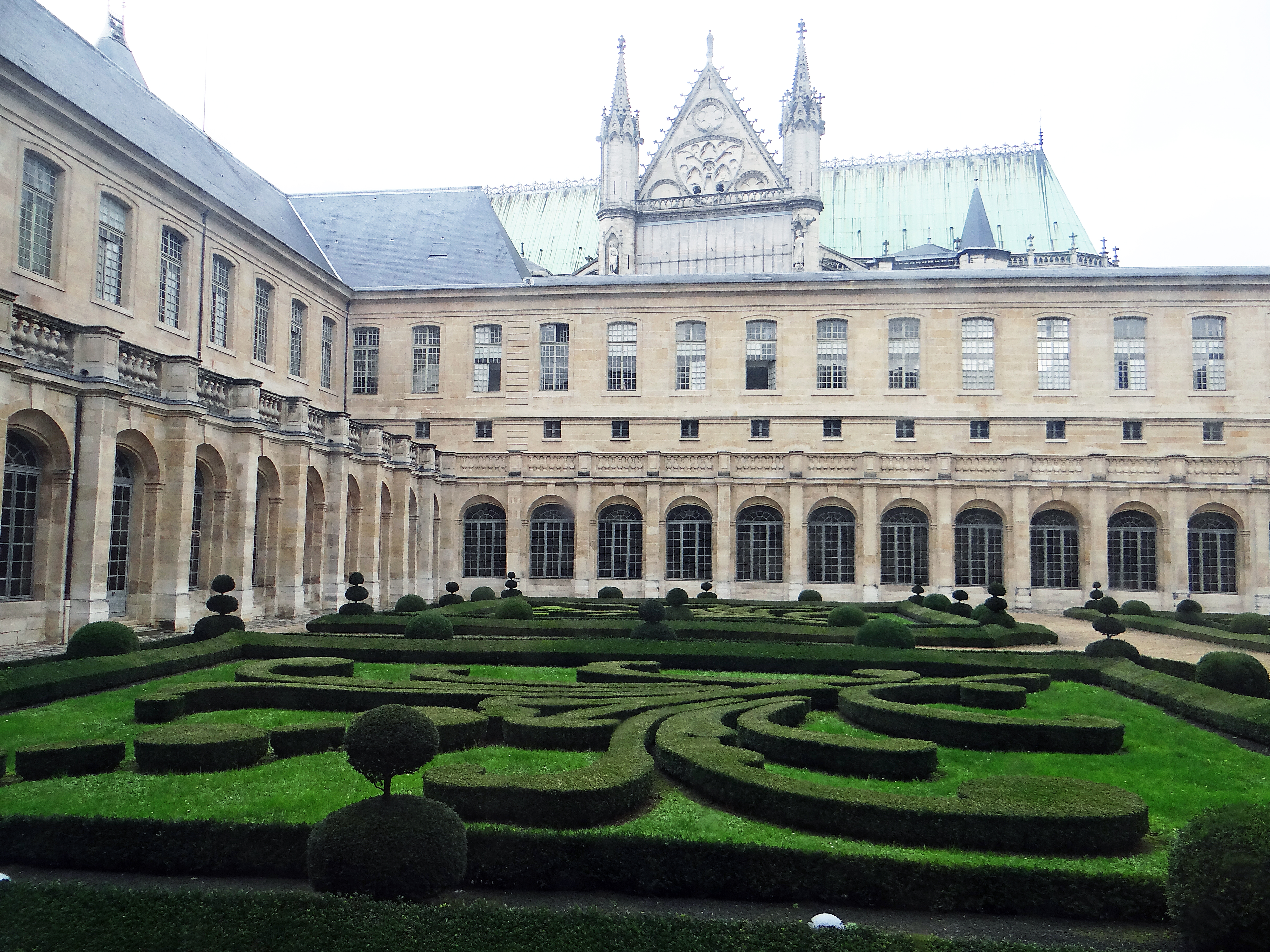 Saint-Denis - Basilique Saint-Denis vue du cloître de l'abbaye